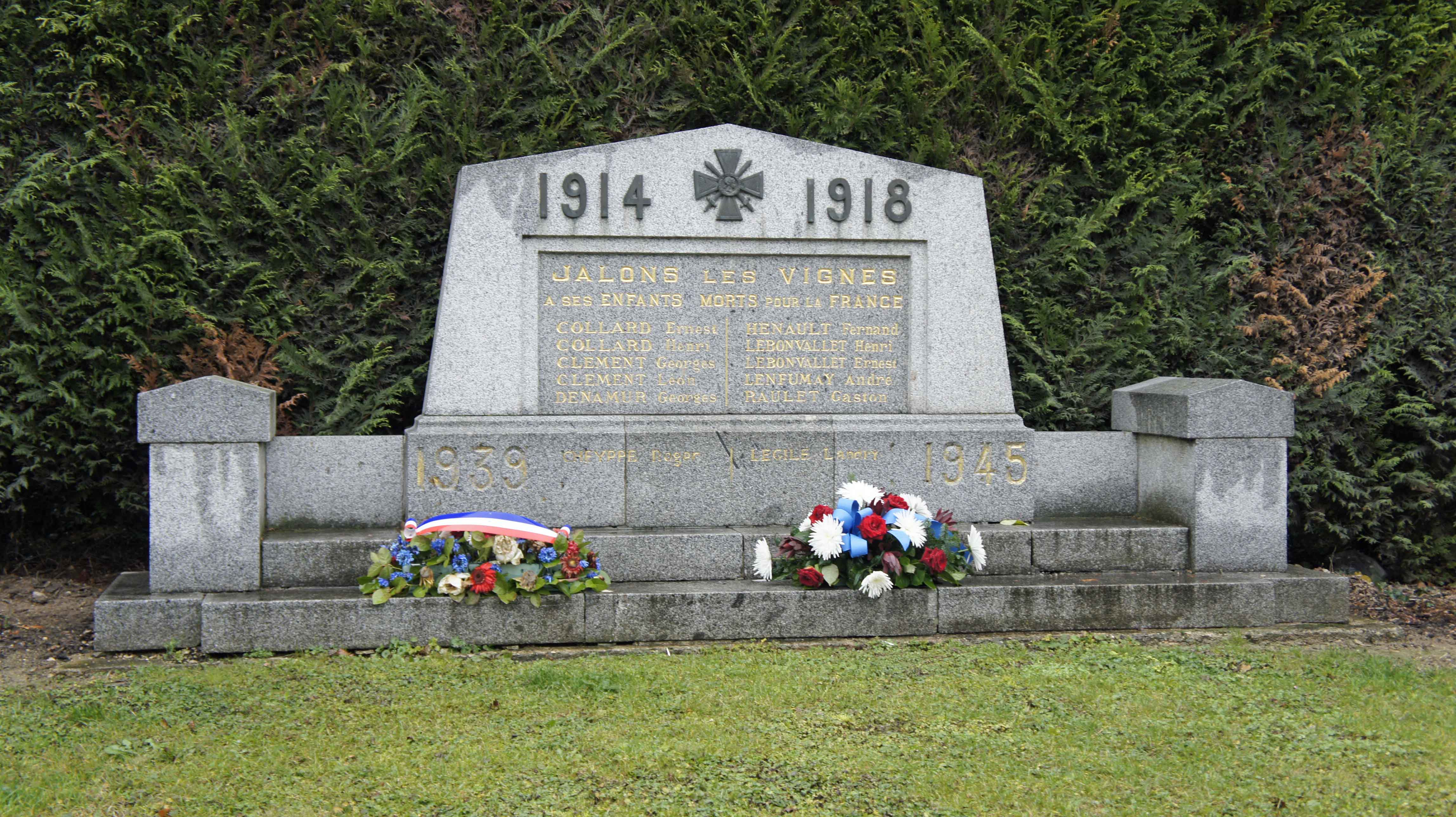 Monument aux morts en la ville de Jâlons. Construction par Ernest Vaxelaire.